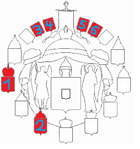 Herby związane z Rzeczpospolitą Herb Królestwa Kongresowego Herb Połączonych Księstw Kijowskiego, Włodzimierskiego i Nowogrodzkiego Połączony herb Księstwa Białoruskiego i Litewskiego. Połączony herb Regionów Północno - Wschodnich Połączony herb Księstw Południowo - Zachodnich Połączony herb Regionów Bałtyckich NA PODSTAWIE